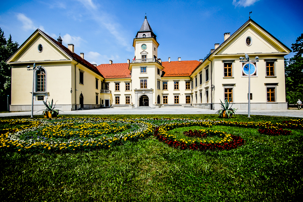 Tarnobrzeg, Pałac Tarnowskich w Tarnobrzegu Wikidata has entry Q5319923 with data related to this item.